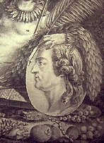 Frontispice de l'édition de 1775